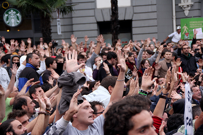 Imagen de la concentración del 25 de septiembre frente al Congreso de los Diputados en Madrid, España. Al final de la misma se produjeron cargas policiales incluso en la estación de Atocha